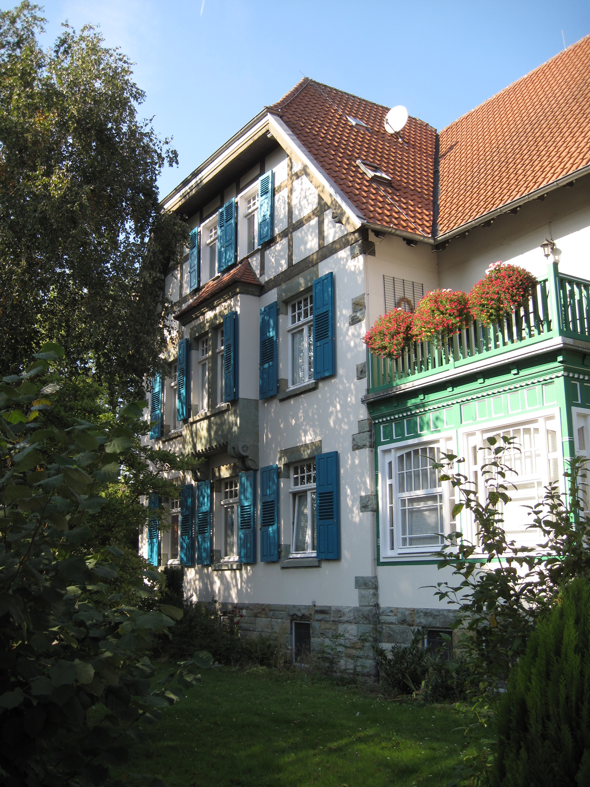 Dienstwohnhaus der Justizvollzugsanstalt, Plaschkestraße 1 in Werl.